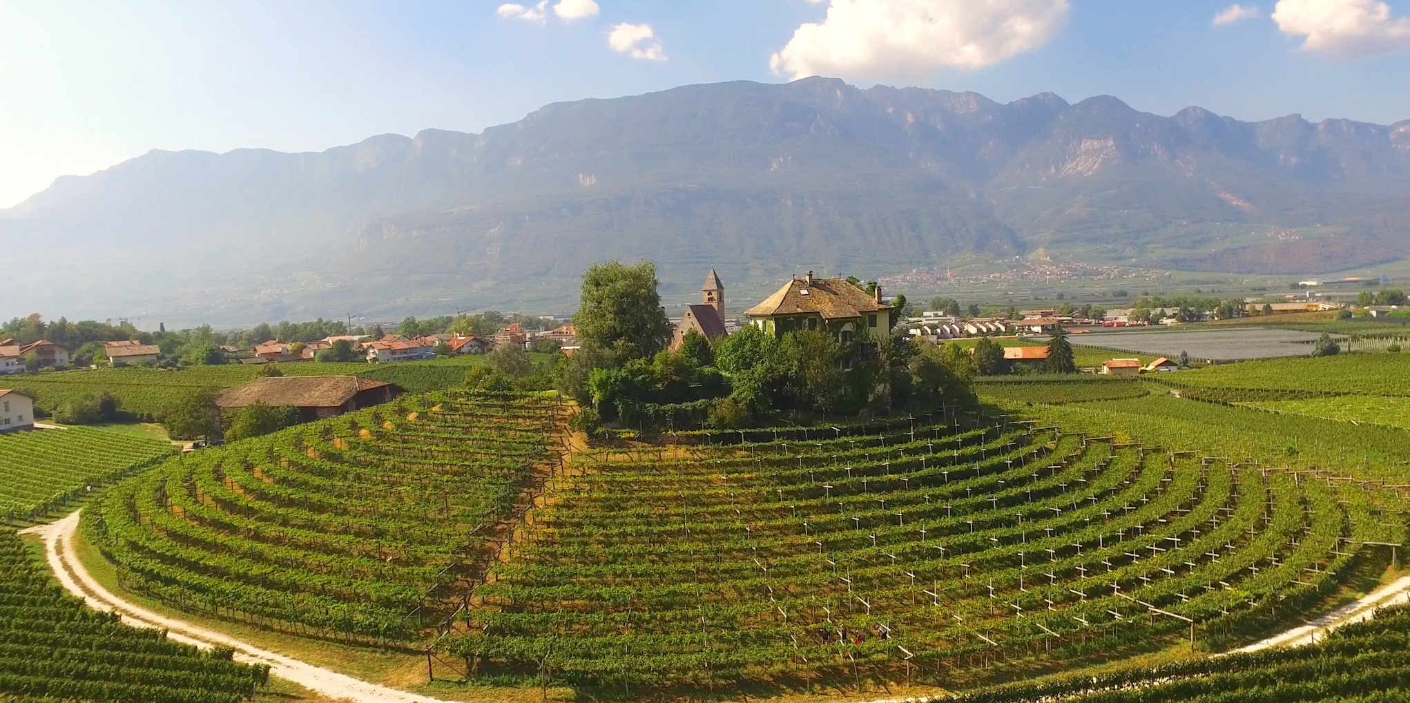 Das Villnerschlössl bzw. Viller Schlössl im Weingut Baron Longo in Neumarkt an der Etsch in Südtirol mit der Villner Kirche im Hintergrund.